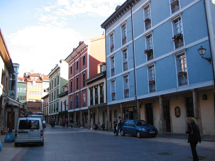 Descripción: Foto de El Fontán en Oviedo, Asturias. Fuente: Foto tomada por Rodrigouf el 21 de octubre de 2005.